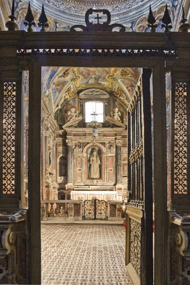 cappella seicentesca S Maria Suricorum -Duomo S Maria C V - barocco